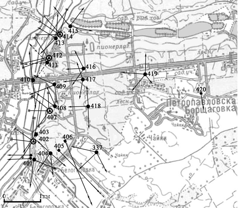 Схема БРО 3 Київського укріпленого району, викладена у вільний доступ авторами книги "Киевский укрепленный район 1928—1941" (